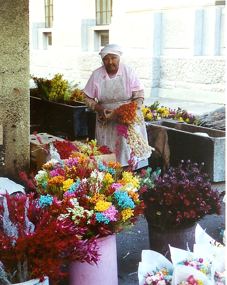 Sujet: Blummestand zu Kapstad Source: Eege Foto vum user ernmuhl Lizenz:GDFL